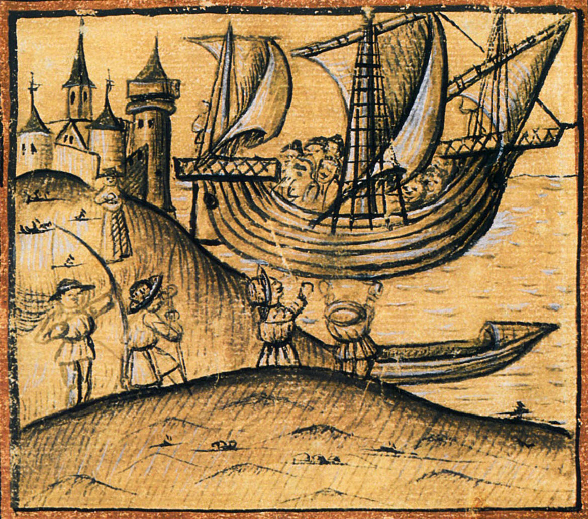 Abbildung zu Beginn des 4. Kapitels des Le Canarien Version B